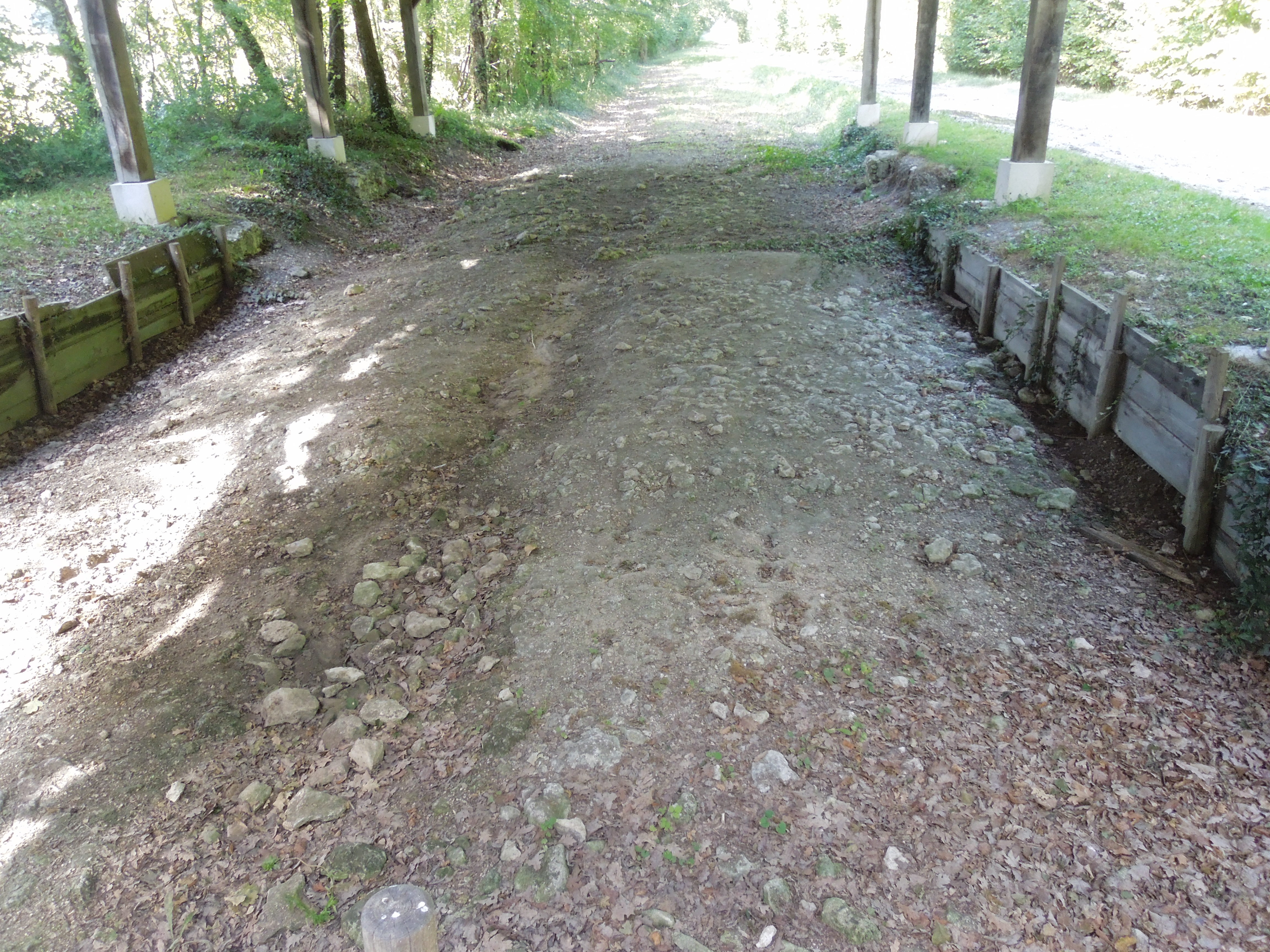 Freigelegte Reste einer römischen Heerstraße bei Neulles und Neuillac